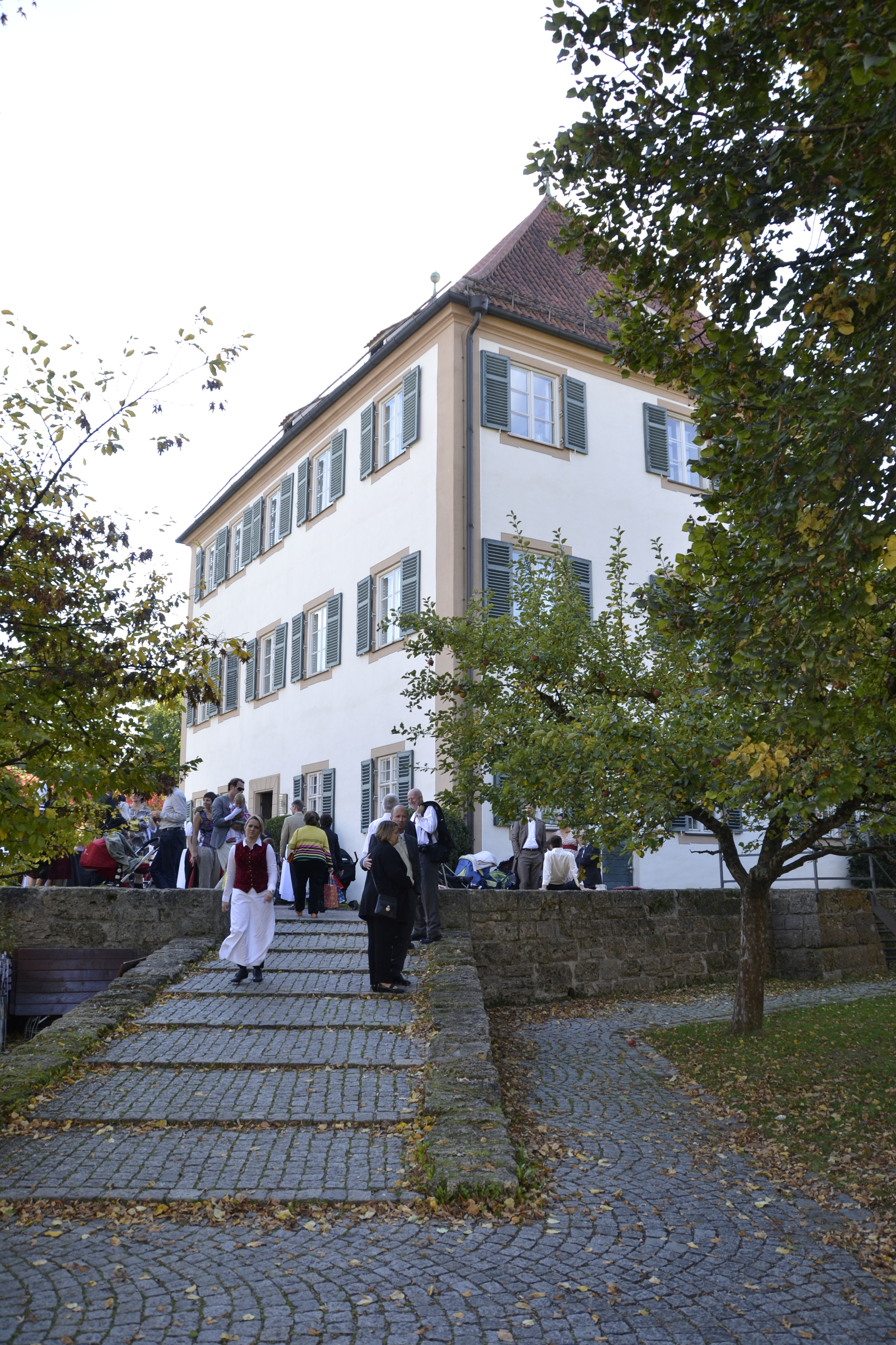 Das Herrenhaus des Schloss Blutenburg in München im Herbst 2012.